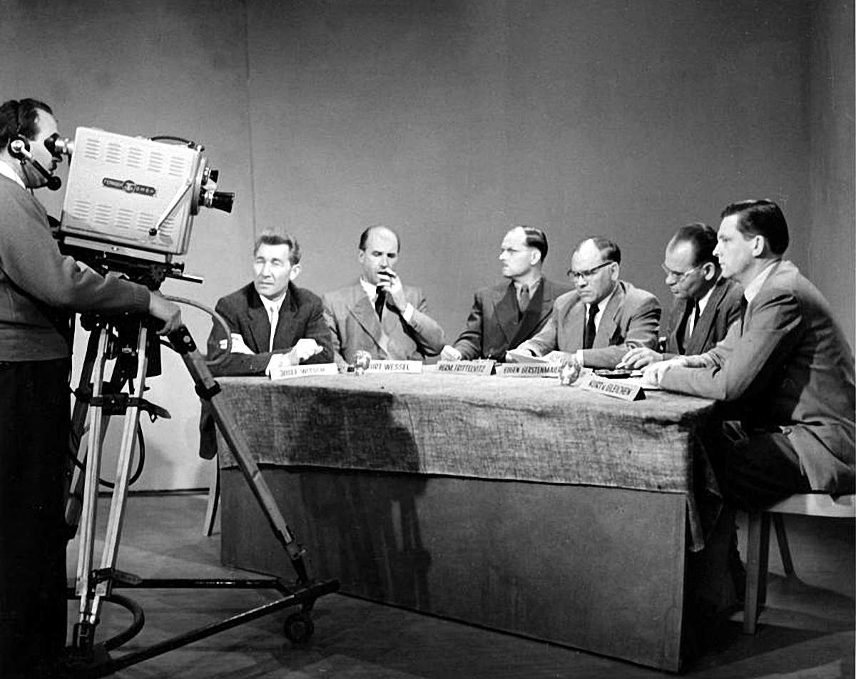 Fernsehstudio Köln Journalistengespräch über die Saarfrage. Die Bundestagsabgeordneten Trittelvitz (SPD) und Eugen Gerstenmaier (CDU) stellten sich dem Kreuzfeuer von vier Journalisten.